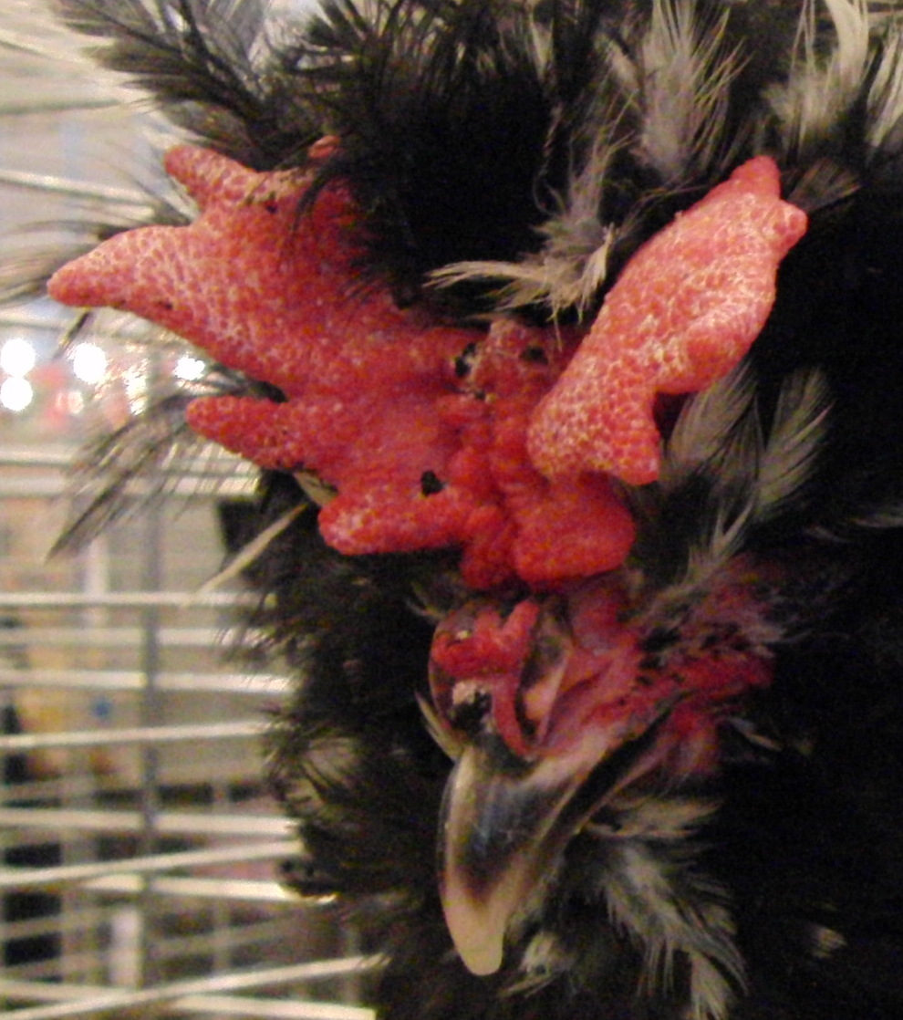 Tête d'un coq Houdan - Salon international de l'agriculture 2013, Paris, France